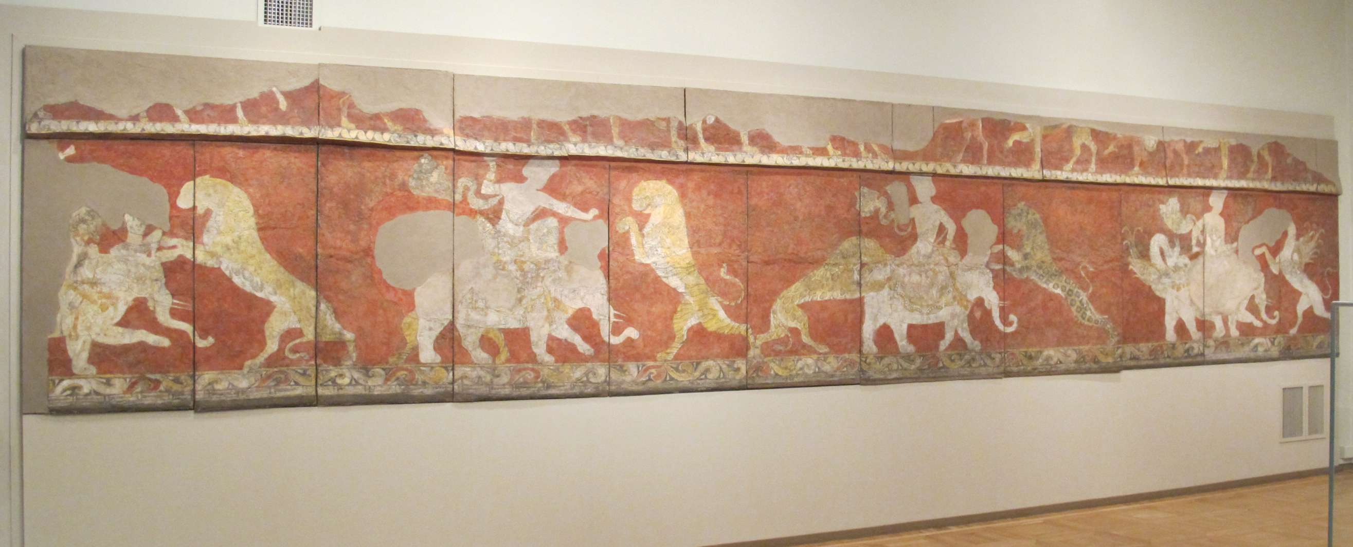 Fregio rosso, palazzo di varakhsha, camera 11, pareti sud ed est (parz), VII-VIII sec